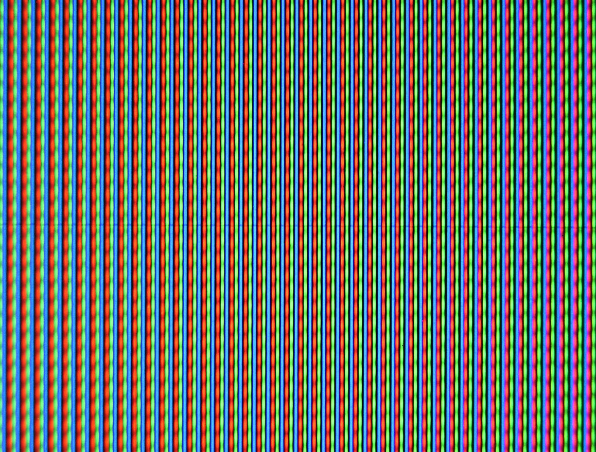 Makroaufnahme eines Monitores mit Streifenmaske aus ca. 1cm Entfernung